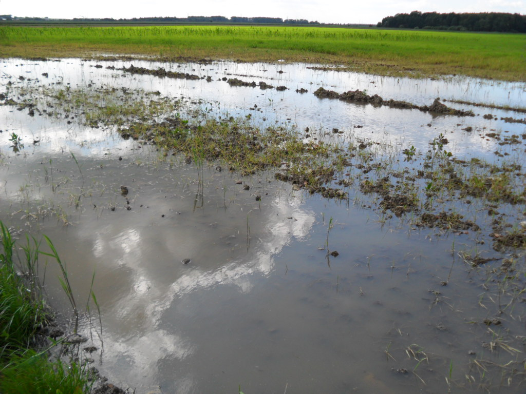 środowisko życia przekopnicy właściwej (Triops cancriformis)